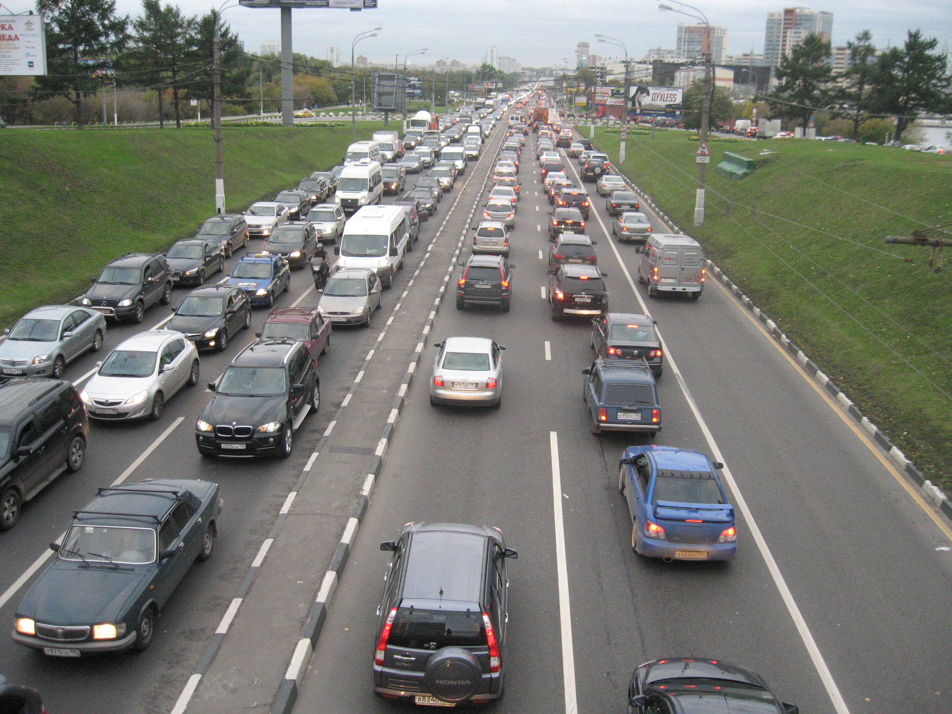 Начало проспекта Андропова. Вид с эстакады на улице Трофимова.